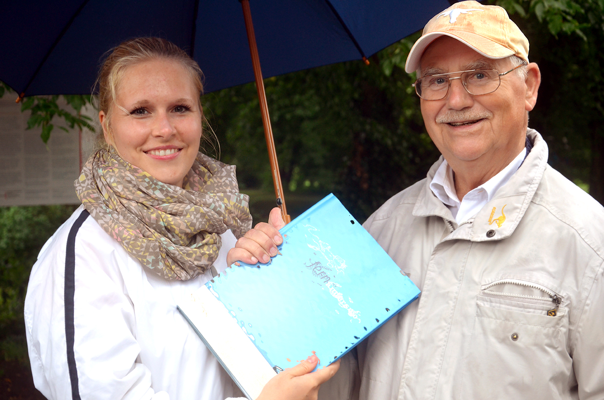 Trotz Regenwetters gute Laune: Nach einer Führung durch den Hinüberschen Garten in Hannover-Marienwerder anlässlich des 250-jährigen Jubiläums des mit Freimaurer-Symbolen durchwirkten Parkes im Englischen Landschaftsgarten-Stil überreicht Katharina Sterzer, Geschäftsführerin vom Freundeskreis Hannover, dem Ehren-Meister vom Stuhl der Johannisloge Friedrich zum weißen Pferde Siegfried Schildmacher ein Buch als Dankeschön ...